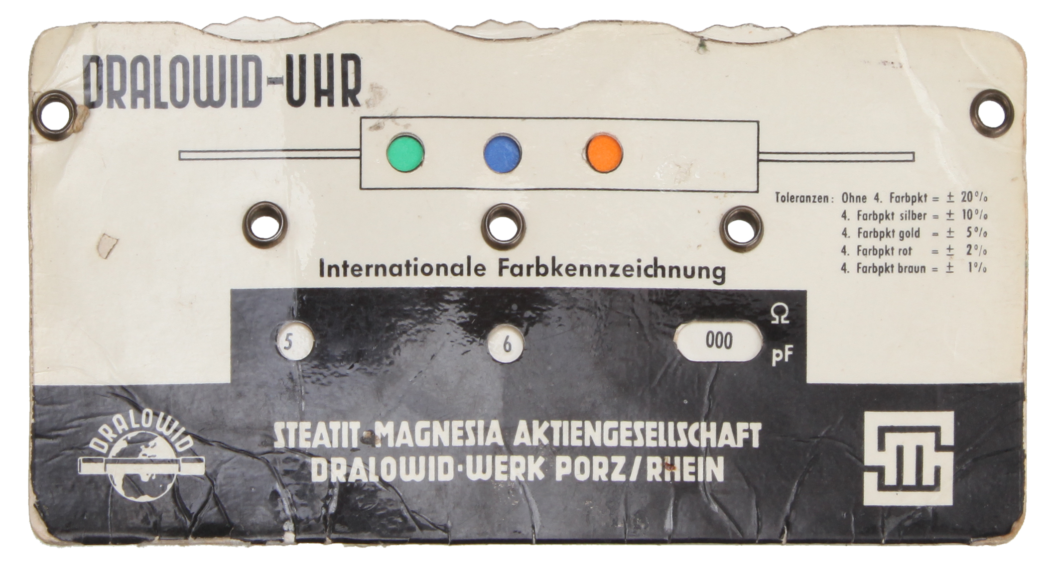 Widerstandsuhr Widerstand (Bauelement)